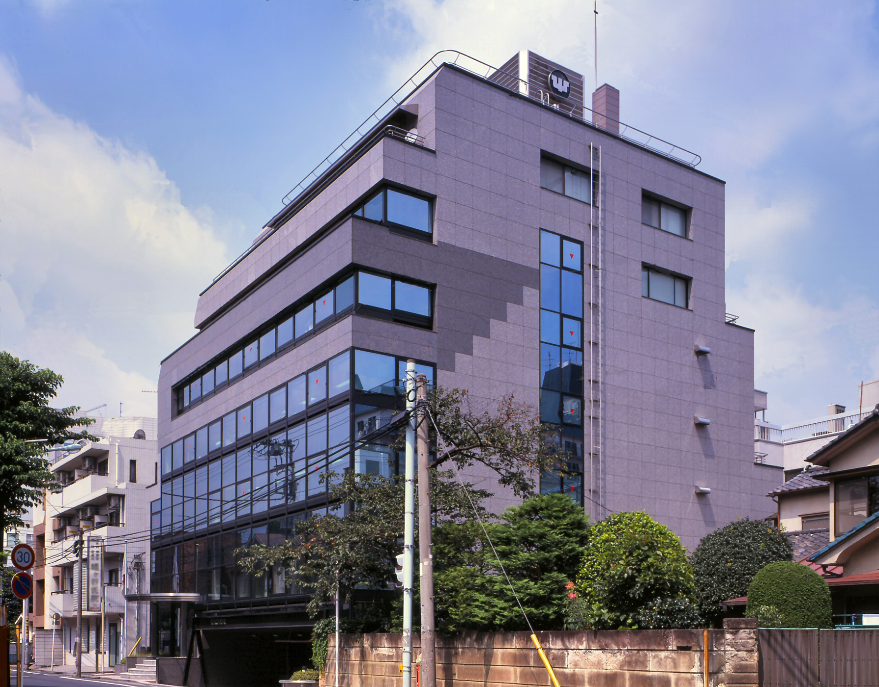 横森製作所本社